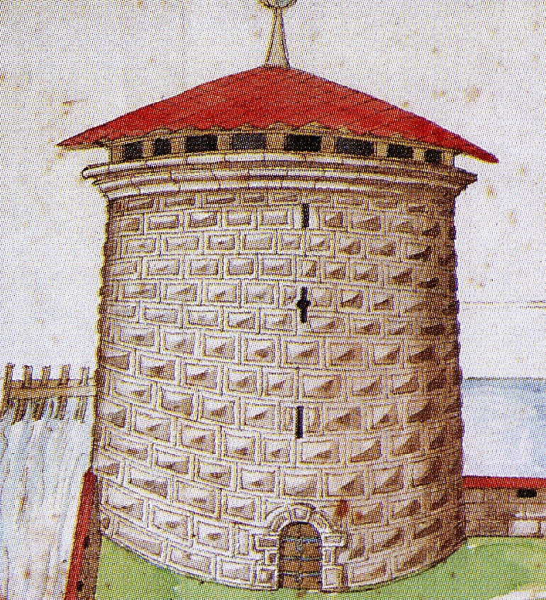 Der Bollwerksturm in Heilbronn, in dem Götz von Berlichingen gefangengehalten wurde. Aquarellierte Federzeichnung um 1586 (Ausschnitt)